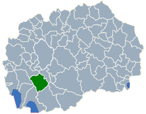 Map of Opština Demir Hisar (Демир Хисар)